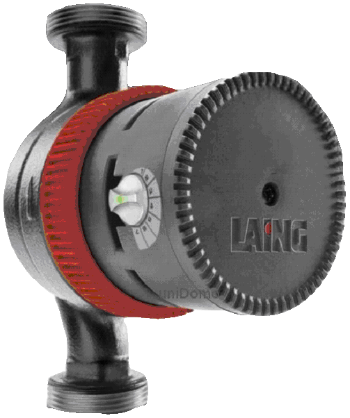 Effizensklasse A Pumpe